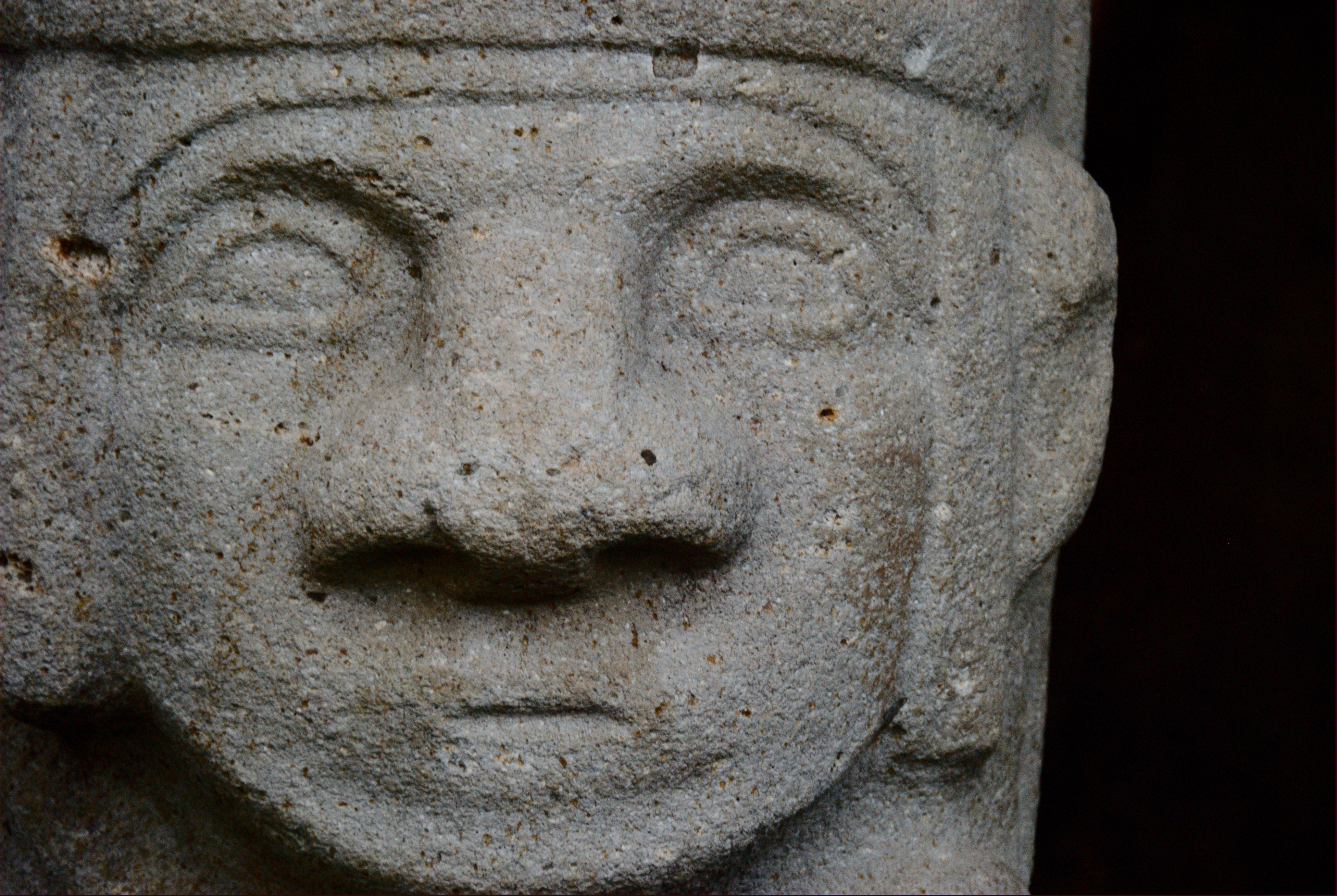 Parque arqueológico de San Agustín